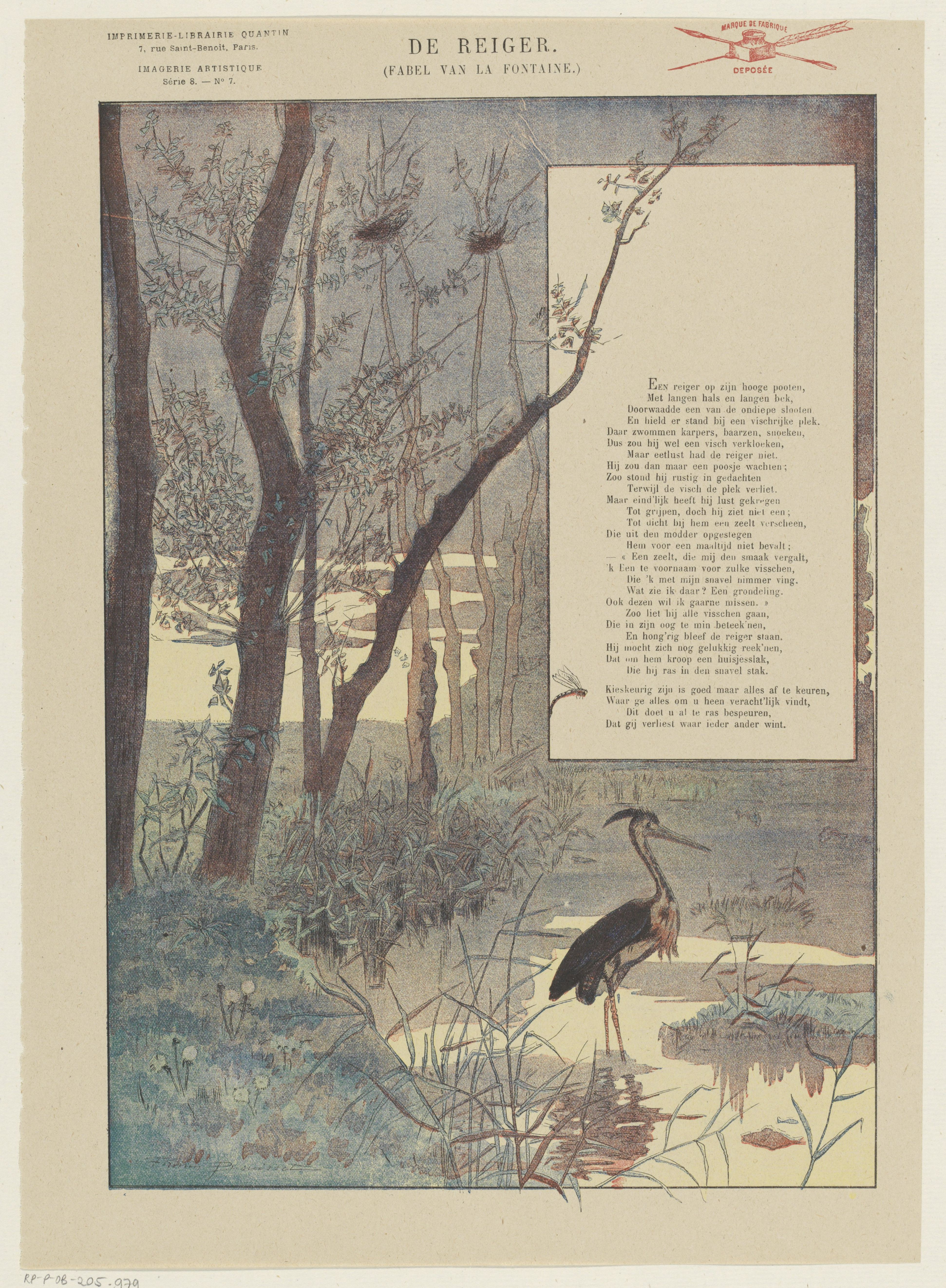 IdentificatieTitel(s): De reiger (titel op object)Fabel van La Fontaine (serietitel op object)Imagerie Artistique / Série 8 (serietitel op object)Objecttype: prent volksprent Serienummer: 7/20Objectnummer: RP-P-OB-205.979Opschriften / Merken: verzamelaarsmerk, verso, gestempeld: Lugt 2760octrooivermelding, recto rechtsboven, gestempeld: ‘marque de fabrique / deposée’, rode stempel met inktpot, pen en schrijfveerOmschrijving: Blad met een grote voorstelling uit de fabel van Jean de La Fontaine, van de reiger. Een reiger in een landschap. Rechtsboven een tekstblok met versregels. Genummerd linksboven: Série 8. - No. 7.VervaardigingVervaardiger: ontwerper: Firmin Bouisset (vermeld op object)prentmaker: Firmin Bouisset (vermeld op object)uitgever: Albert Quantin (vermeld op object)Plaats vervaardiging: ParijsDatering: 1876 - 1890 en/of 1890Fysieke kenmerken: kleurenlithografie en tekst in boekdrukMateriaal: papier Techniek: kleurenlithografie (procedé) / boekdrukAfmetingen: blad: h 368 mm × b 266 mmOnderwerpWat: fabelsshore-birds and wading-birds: heronVerwerving en rechtenCredit line: Schenking van de heer F.G. Waller, AmsterdamVerwerving: schenking 1923Copyright: Publiek domein